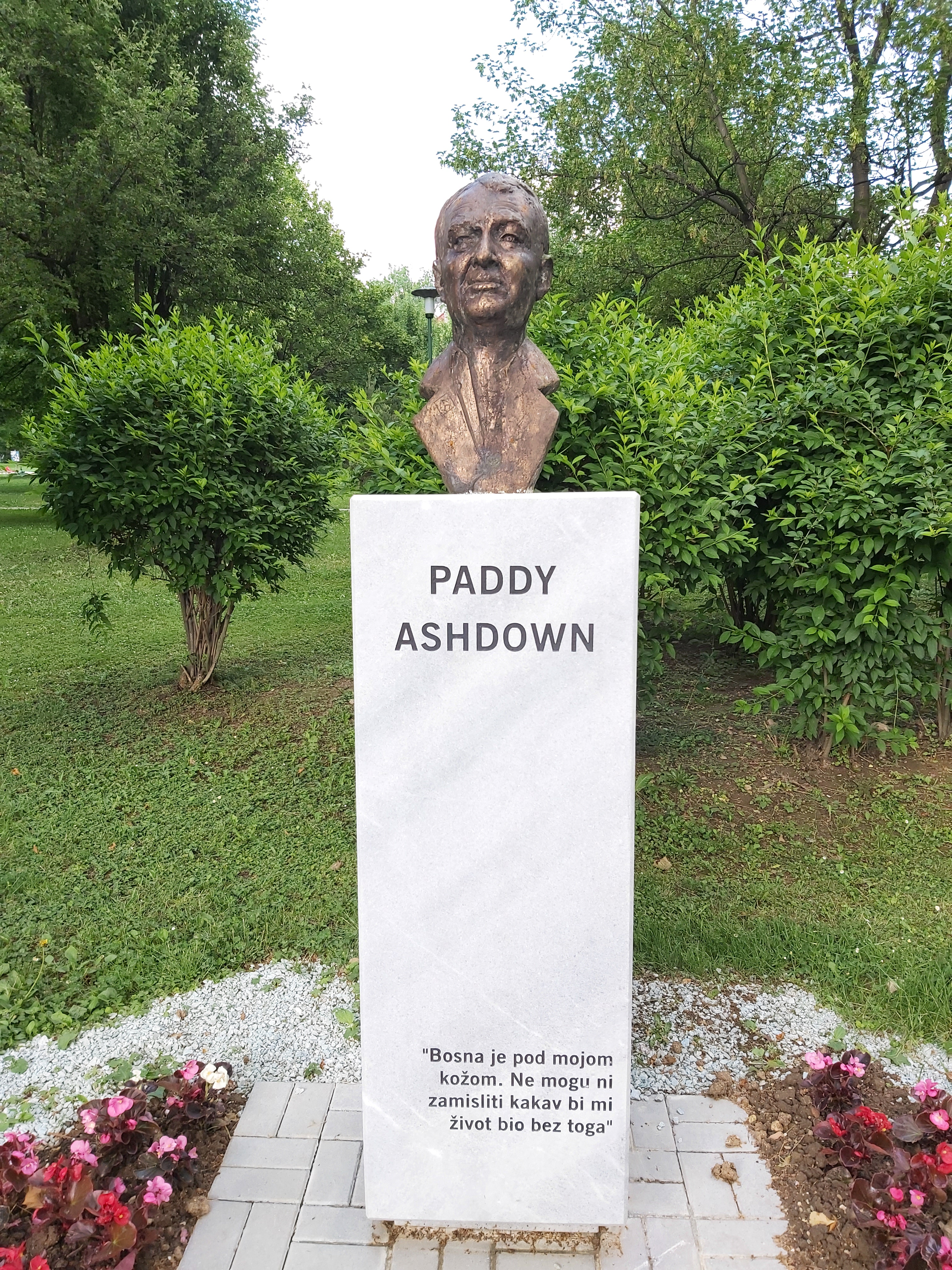 Bista Paddyja Ashdowna u Sarajevu